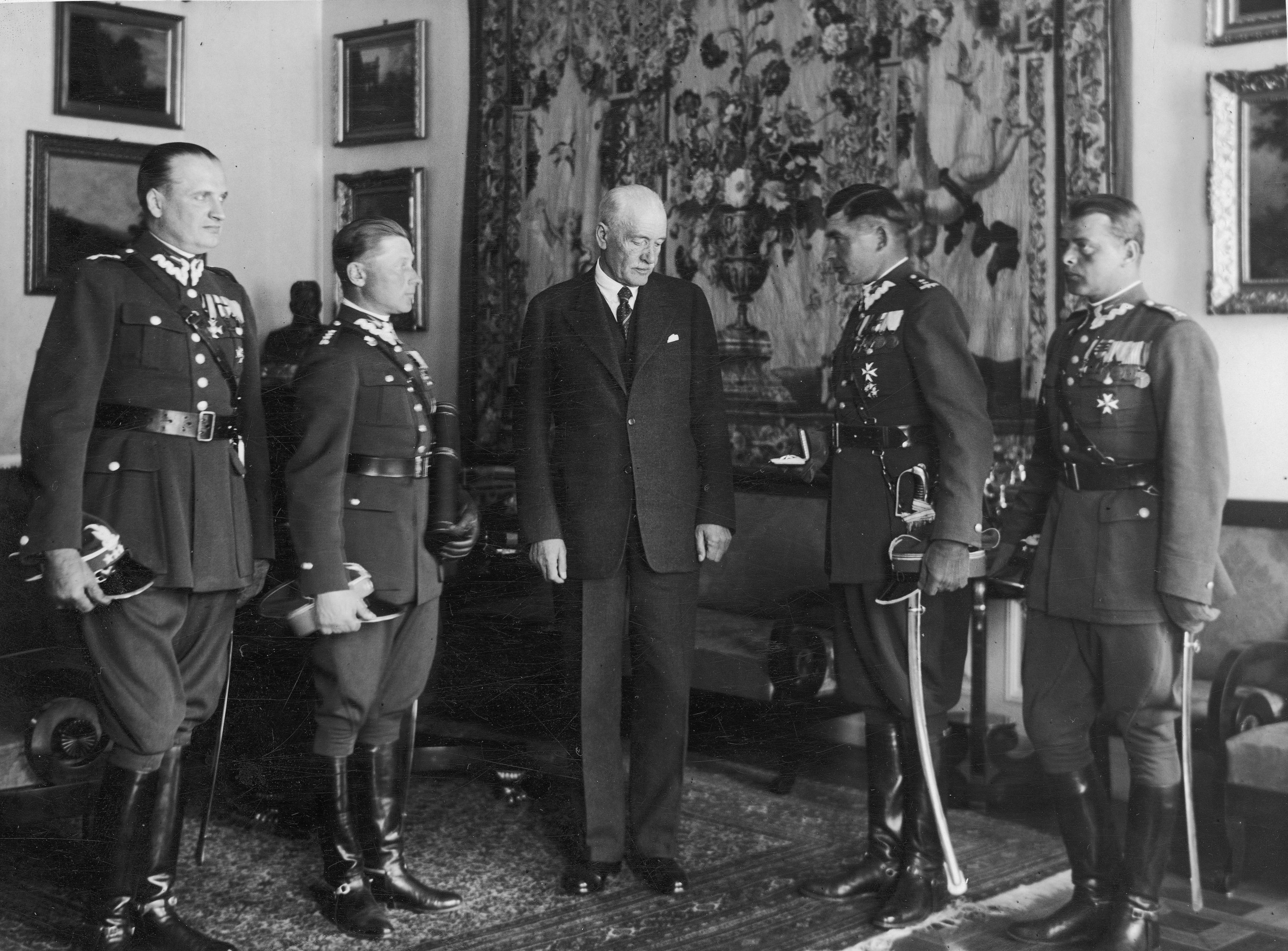 Wręczenie prezydentowi RP Ignacemu Mościckiemu odznaki pułkowej przez delegację 14 Pułku Ułanów Jazłowieckich w Warszawie 7 czerwca 1933. Prezydent Ignacy Mościcki (w środku) z członkami delegacji 14 puł. Członkowie delegacji od lewej: rtm. Skarbek, rtm. Jerzy Strużyński, ppłk Andrzej Kunachowicz (d-ca pułku), por. Gwidon Salomon. Koncern Ilustrowany Kurier Codzienny - Archiwum Ilustracji. Sygnatura: 1-A-1391